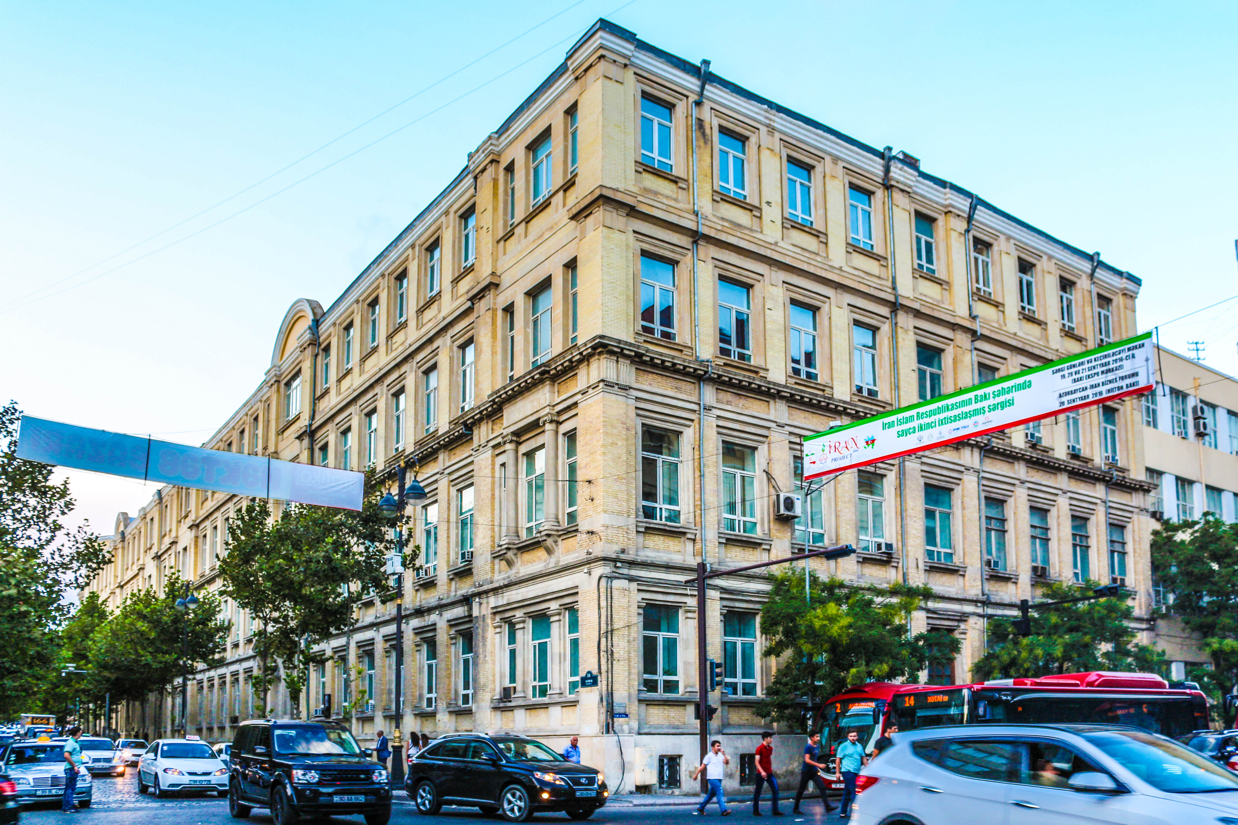 Azərbaycan Dövlət Neft Akademiyasının binası